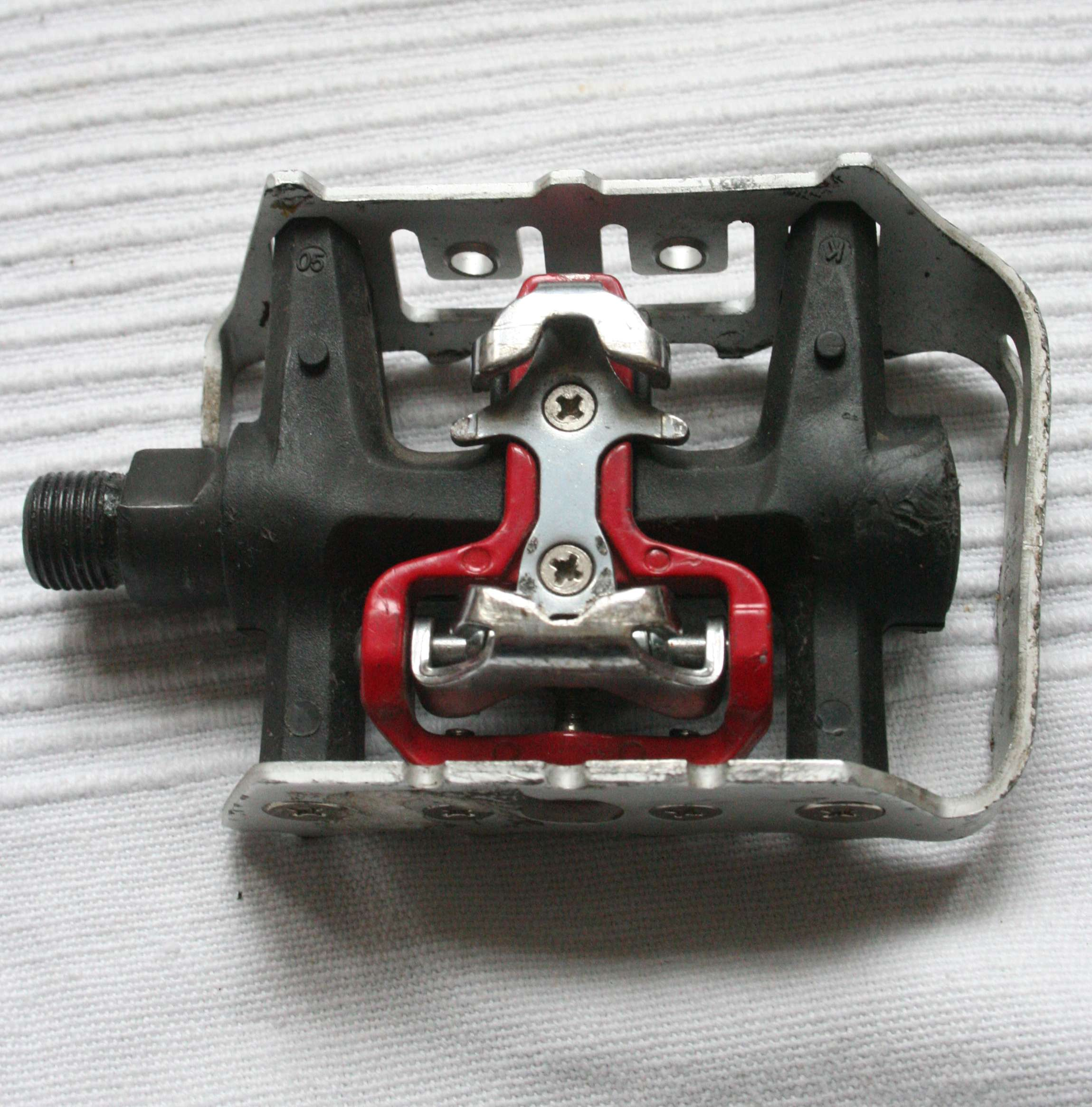 Wellgo Combi Pedals